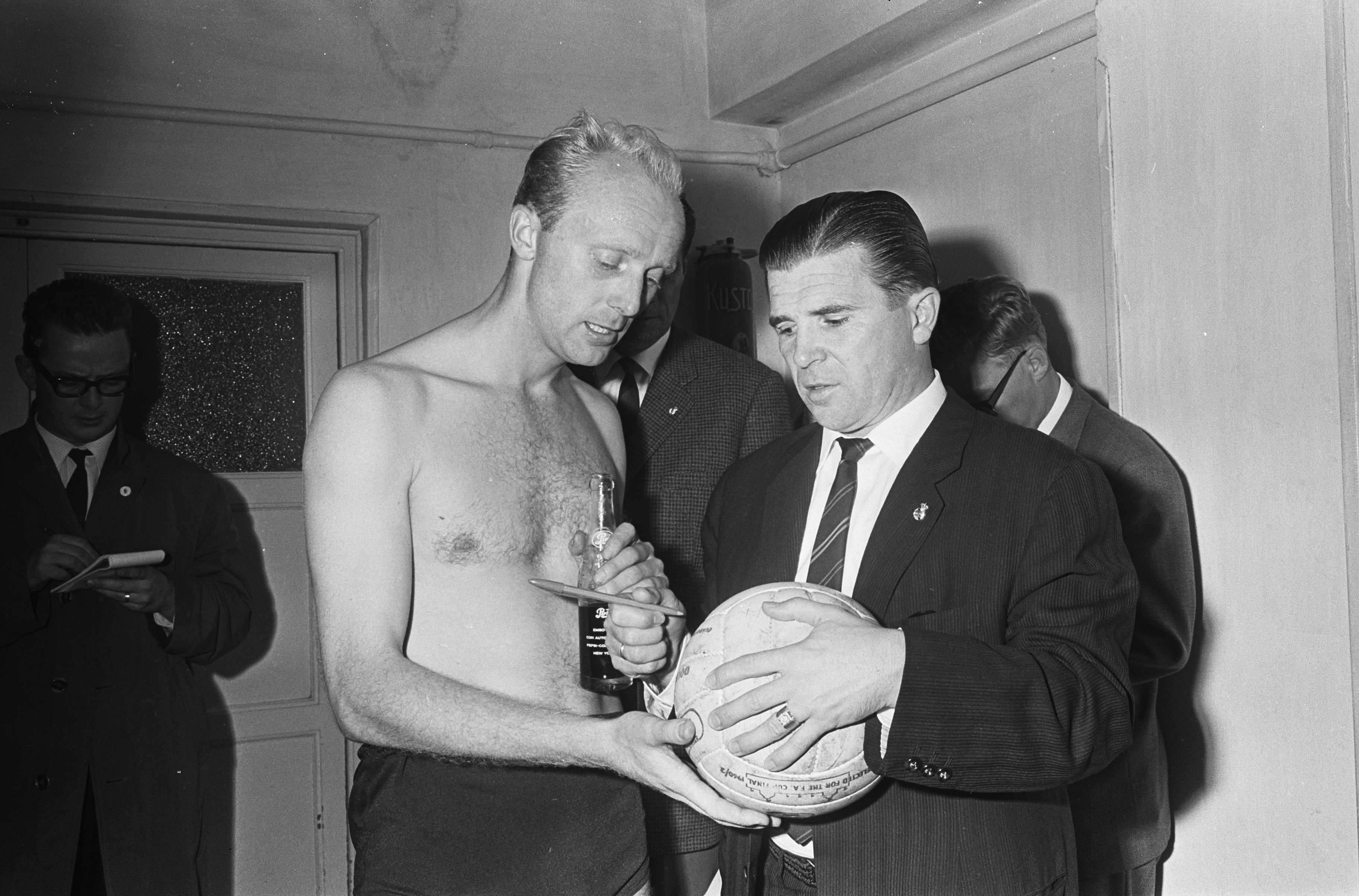 Collectie / Archief : Fotocollectie Anefo Reportage / Serie : [ onbekend ] Beschrijving : Real Madrid tegen Feyenoord 0-5, Kuiver met bal vraagt handtekening van Puskas Datum : 23 september 1965 Trefwoorden : handtekeningen, sport, voetbal Persoonsnaam : Puskas, Ferenc Instellingsnaam : Feyenoord, Real Madrid Fotograaf : Koch, Eric / Anefo Auteursrechthebbende : Nationaal Archief Materiaalsoort : Negatief (zwart/wit) Nummer archiefinventaris : bekijk toegang 2.24.01.05 Bestanddeelnummer : 918-2183